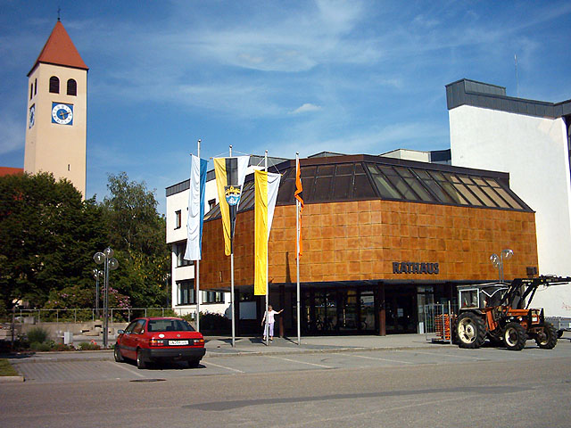 Die katholische Marienkirche (1952) und das Rathaus (1977) in Schwarzenfeld (Oberpfalz)